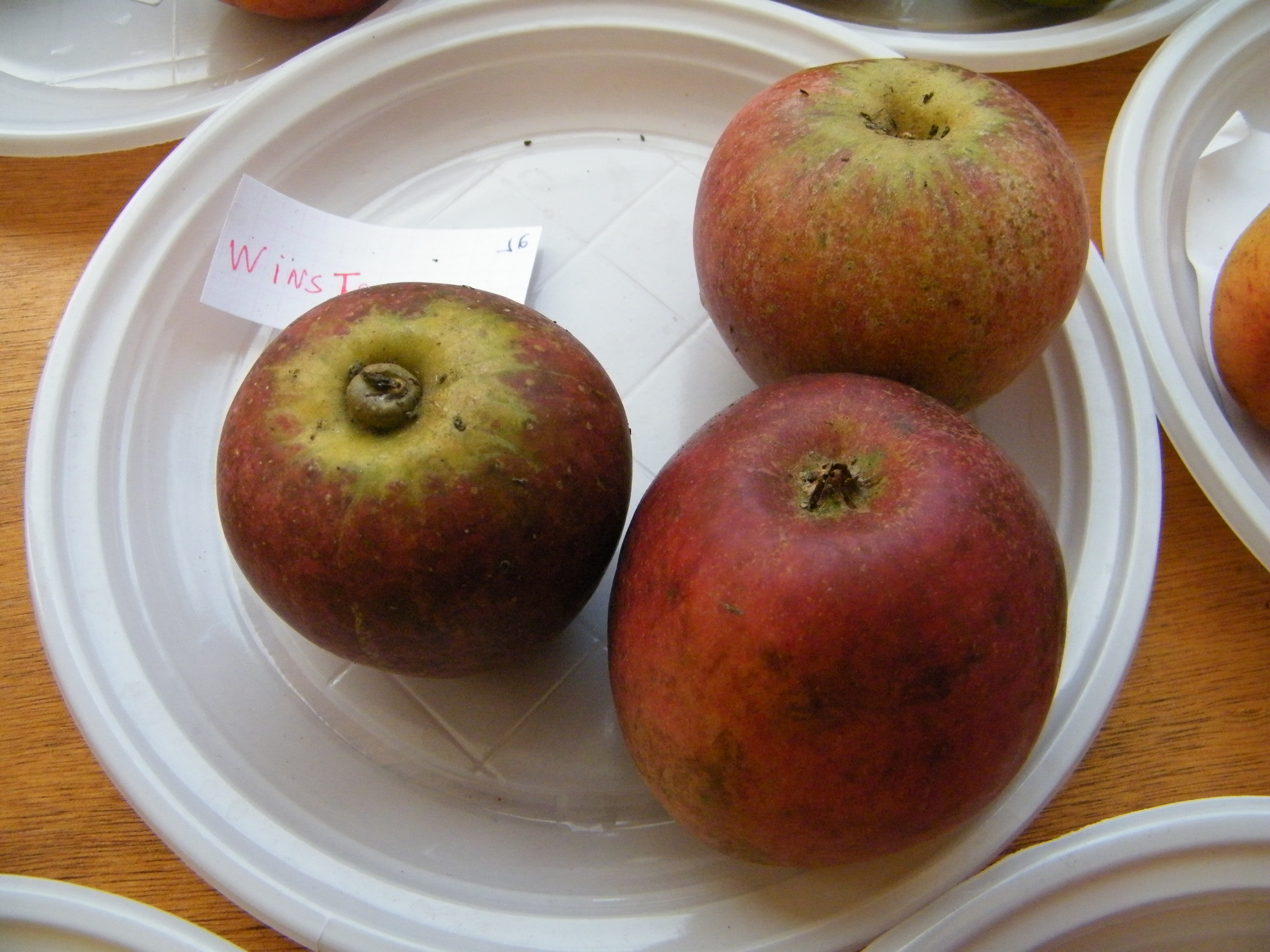 Winston (apple), Mons-Boubert, Somme, Fr, expo du 29-10-2017 (55)